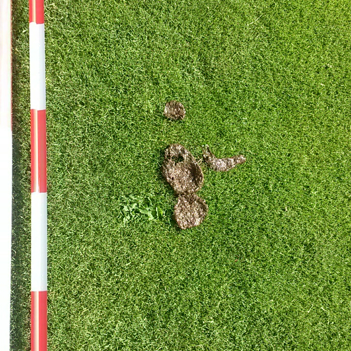 Kuhflade, die im Rahmen des Kuhfladenspieles des SC Pinkafeld erzeugt wurde